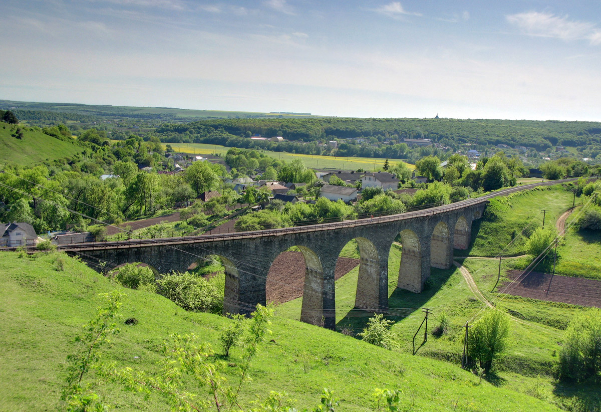 Віадук на перегоні Теребовля - Деренівка